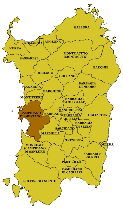 Sardinian Subregions